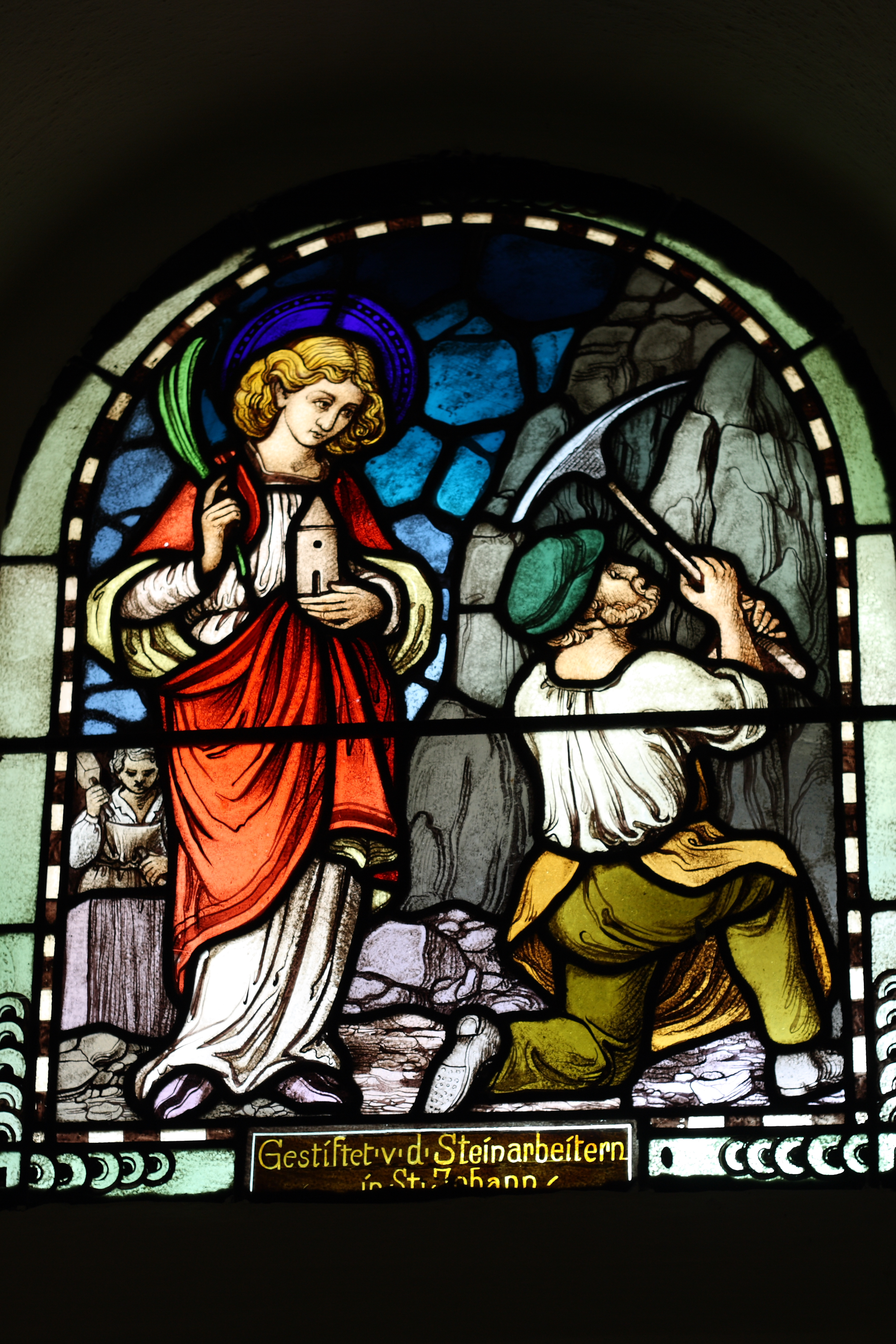 Bleiglasfenster in der katholischen Pfarrkirche St. Johannes Baptist in Sankt Johann, Darstellung: hl. Barbara